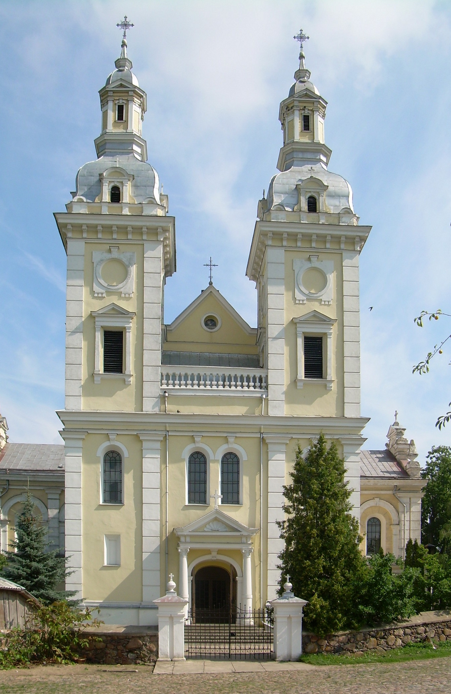 Šeduvos Šv. Kryžiaus Atradimo bažnyčia